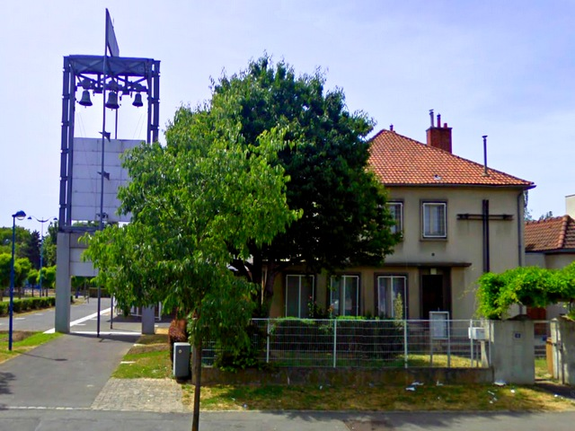 Eglise de Dugny